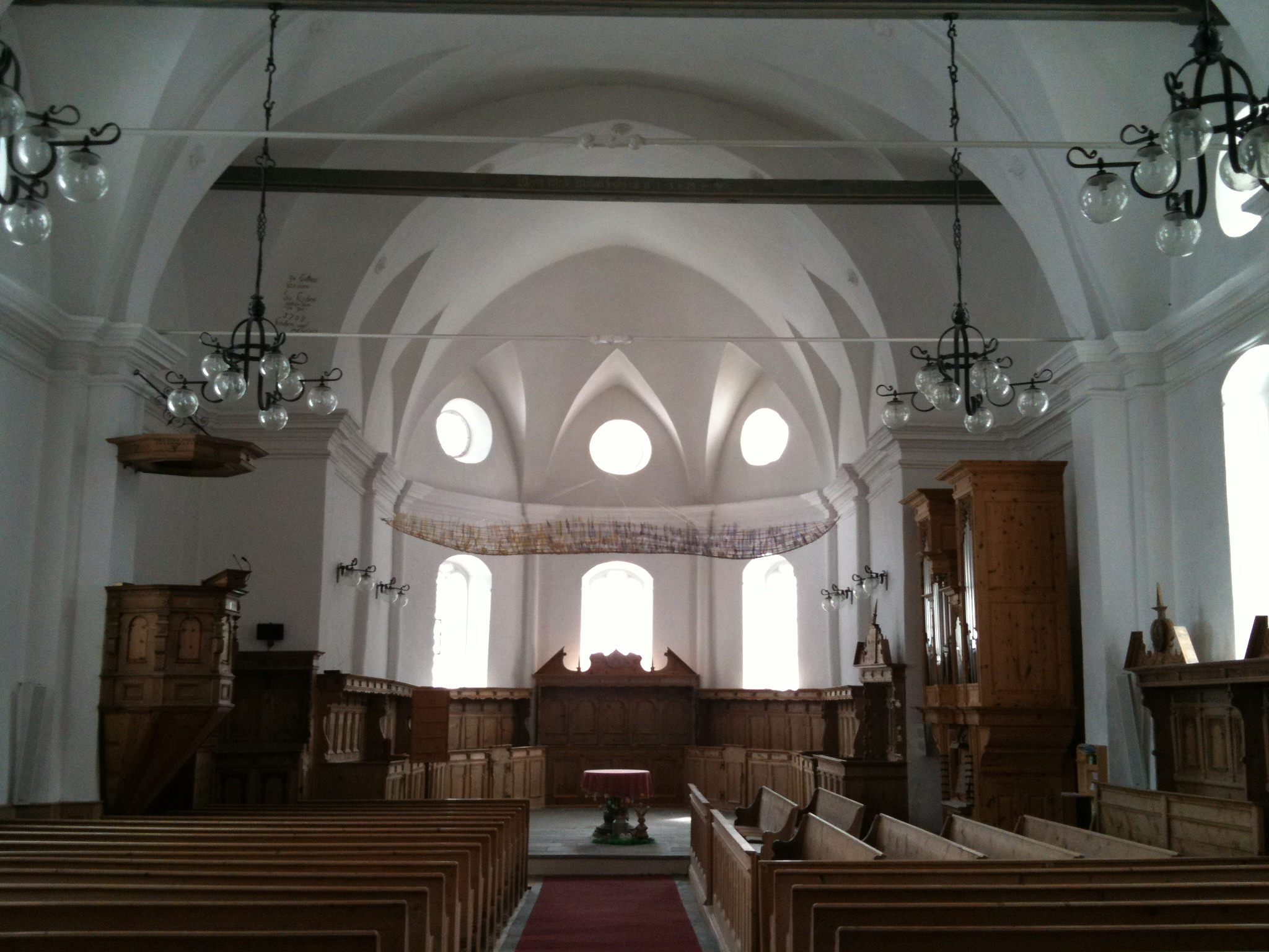 reformierte Kirche Splügen (Kanton Graubünden), Blick Richtung Chor